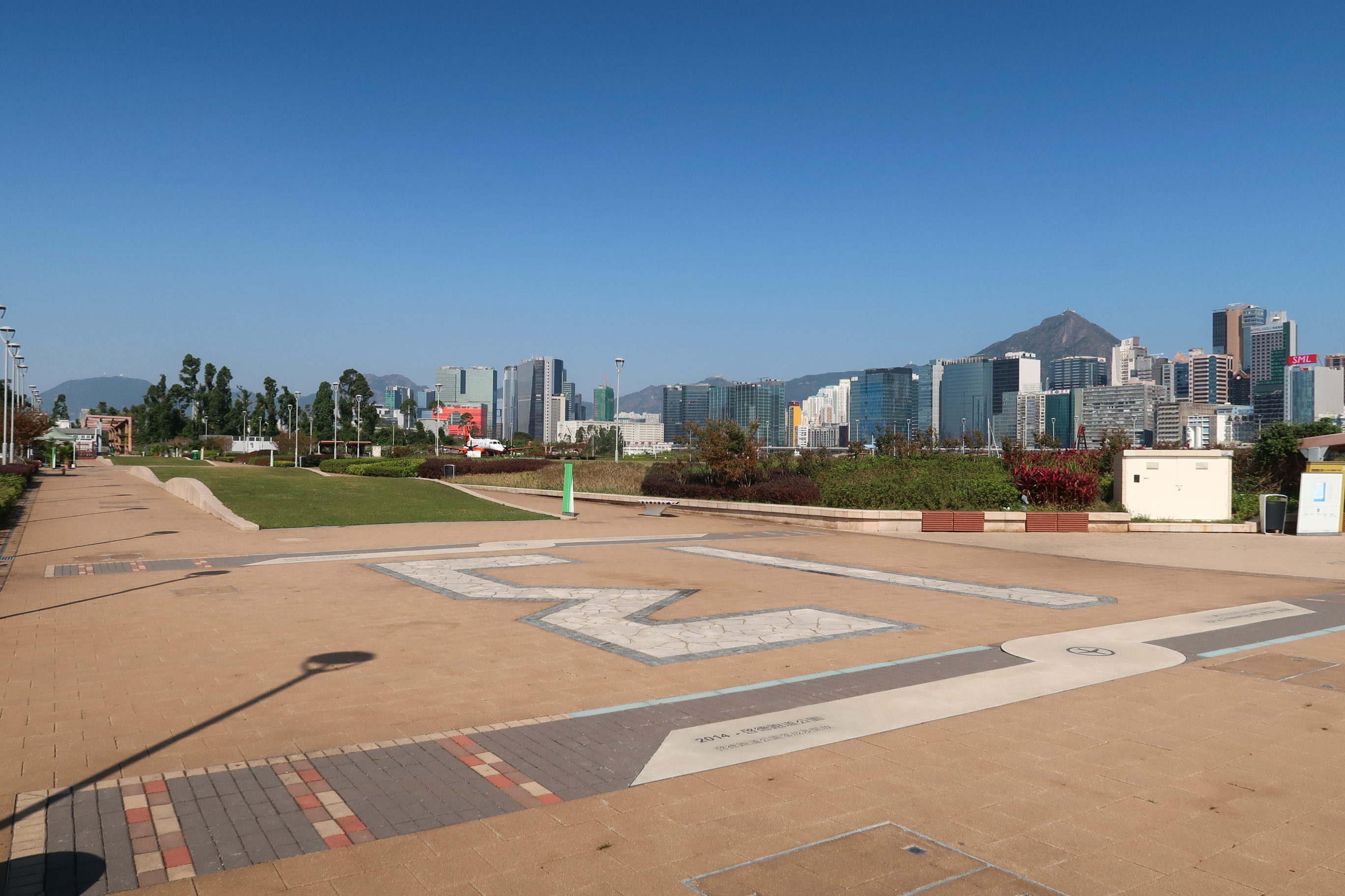 Kai Tak Runway Park